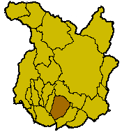 Localisation de la commune de Monsummano Terme à l'intérieur de la province de Pistoia.